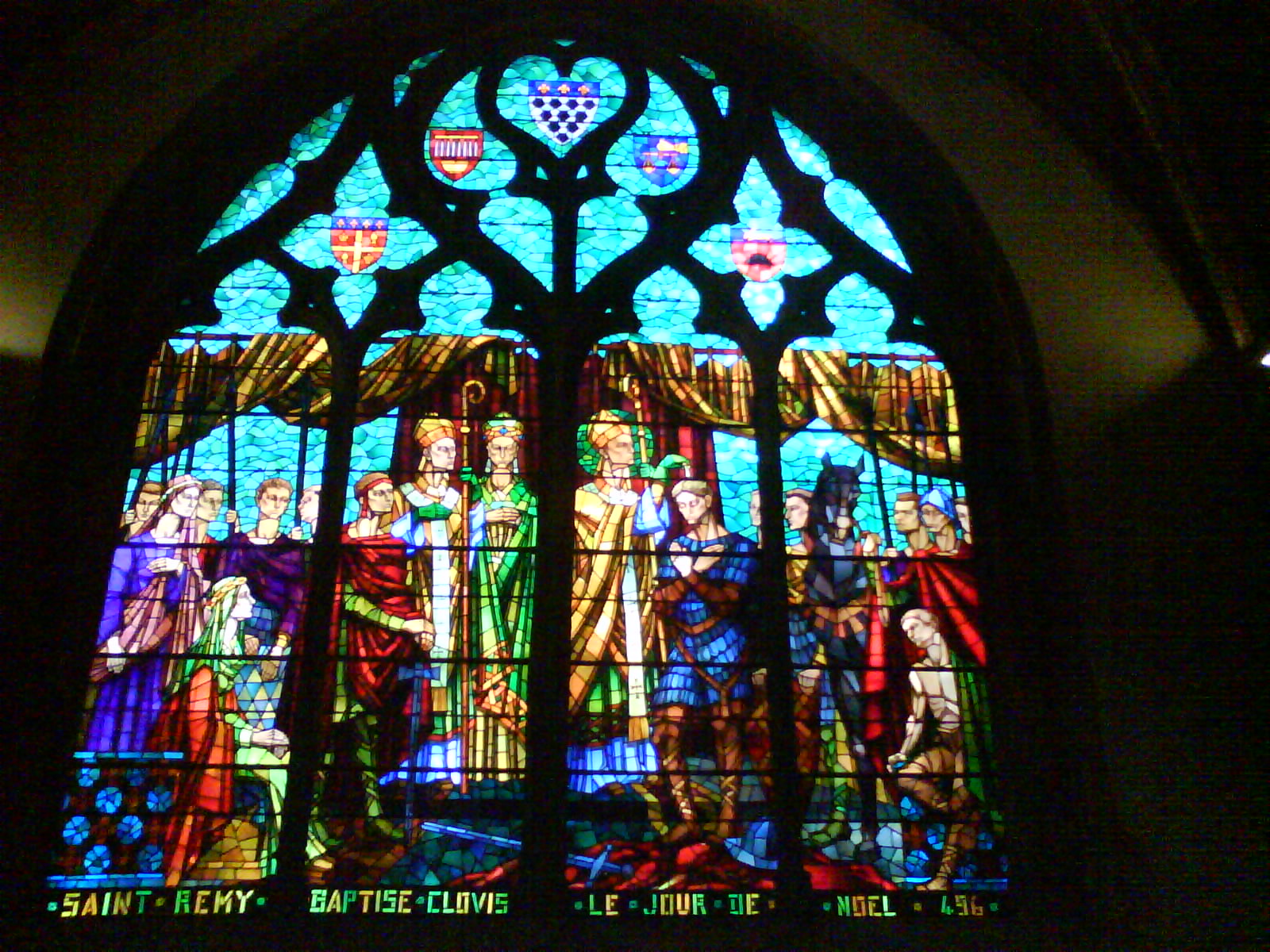 Église Saint-Bonaventure (Lyon 2e), baptême de Clovis roi des Francs, vitrail.